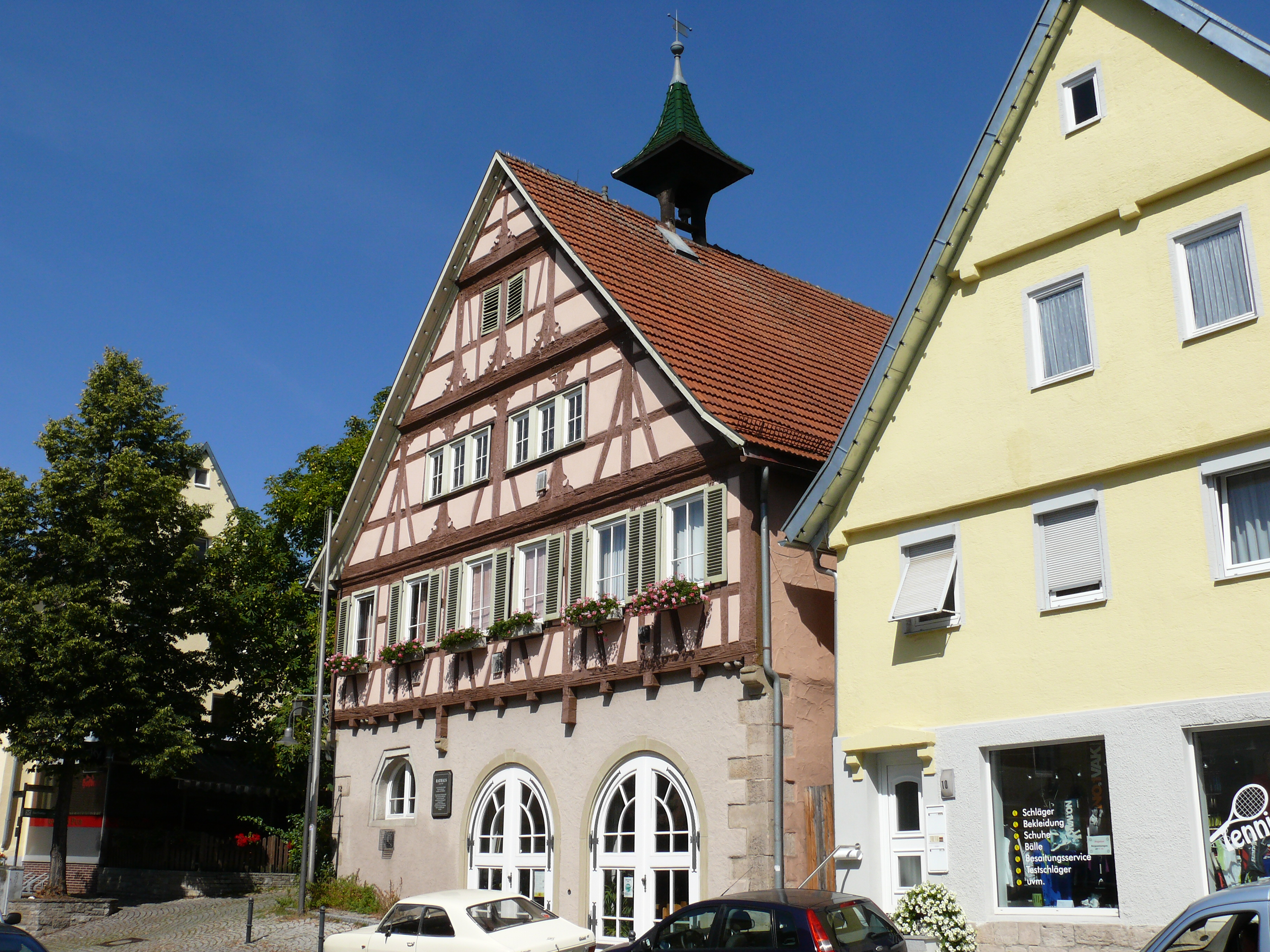 Das historische Rathaus in Weinstadt-Grossheppach.